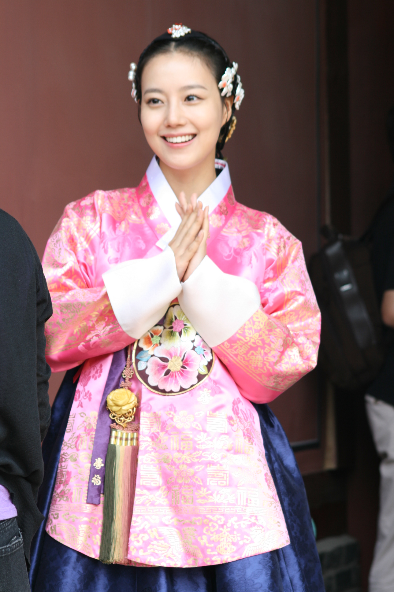 2011년 6월 28일 경복궁에서 진행된 KBS 수목드라마 《공주의 남자》 포스터 촬영.